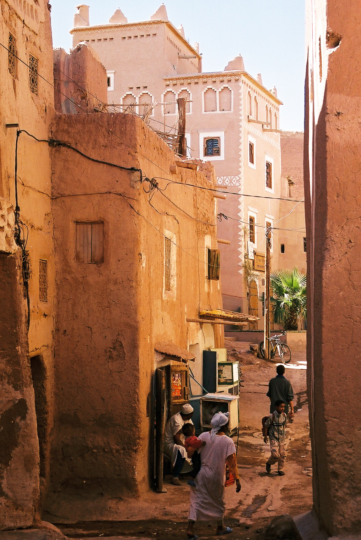 Viertel um die Kasbah Taourirt, Ouarzazate, Marokko